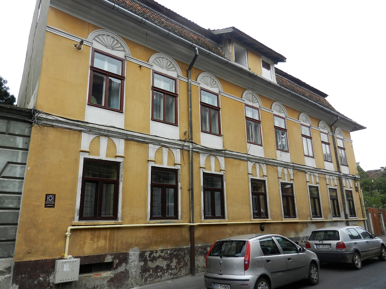 Casă monument istoric (Brancoveanu 21)